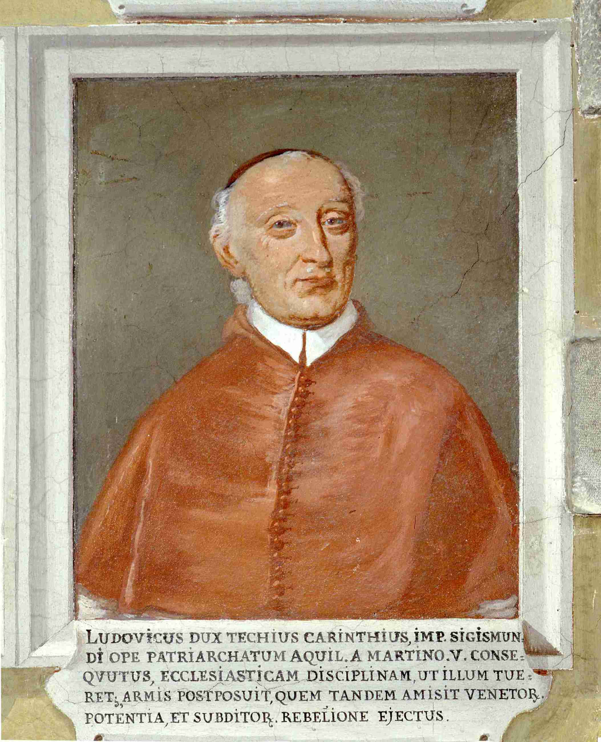 Ludovico-di-Teck - Patriarcato Udine